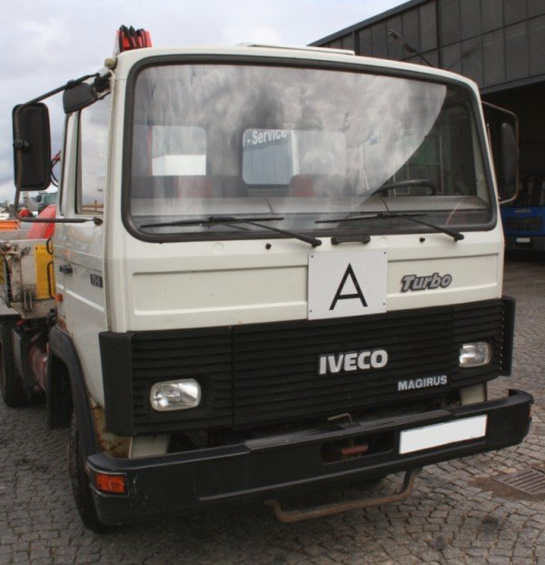 IVECO Magirus 75-9 Pritschenwagen mit Kran